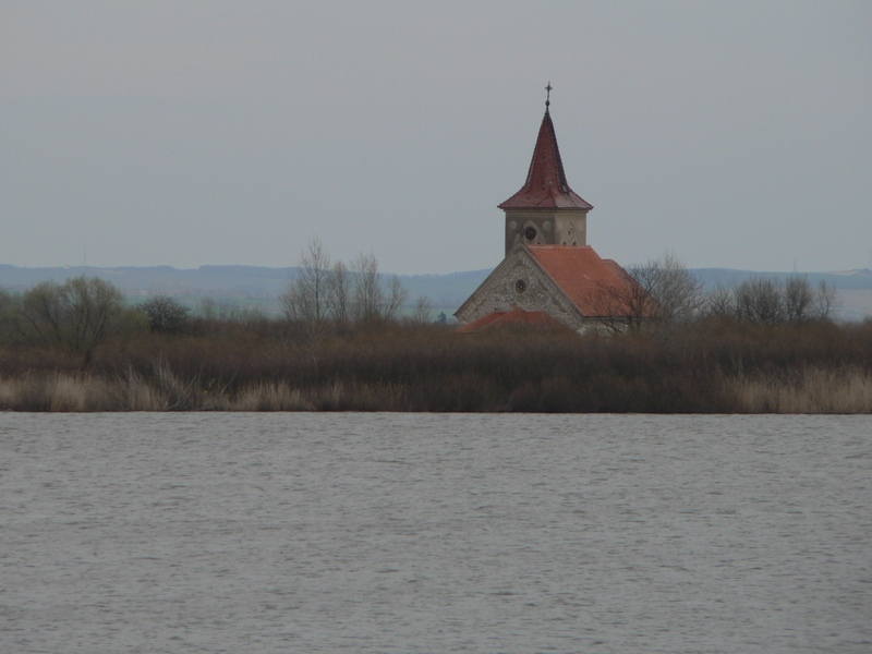 Kostel sv. Linharta, bývalá vesnice Mušov.